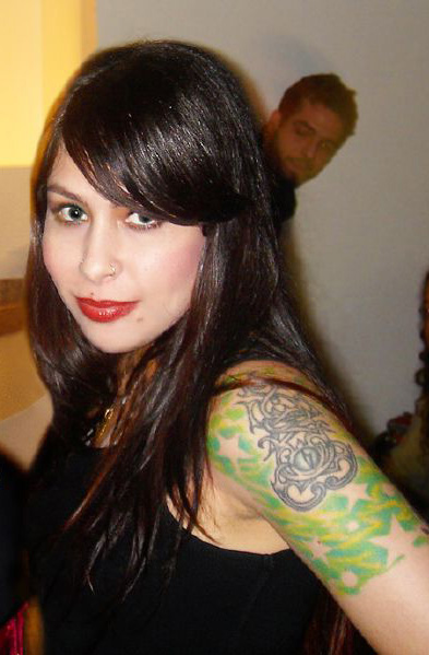 A cantora brasileira Pitty (Priscilla Leone).Pitty e Carol Wojtyla